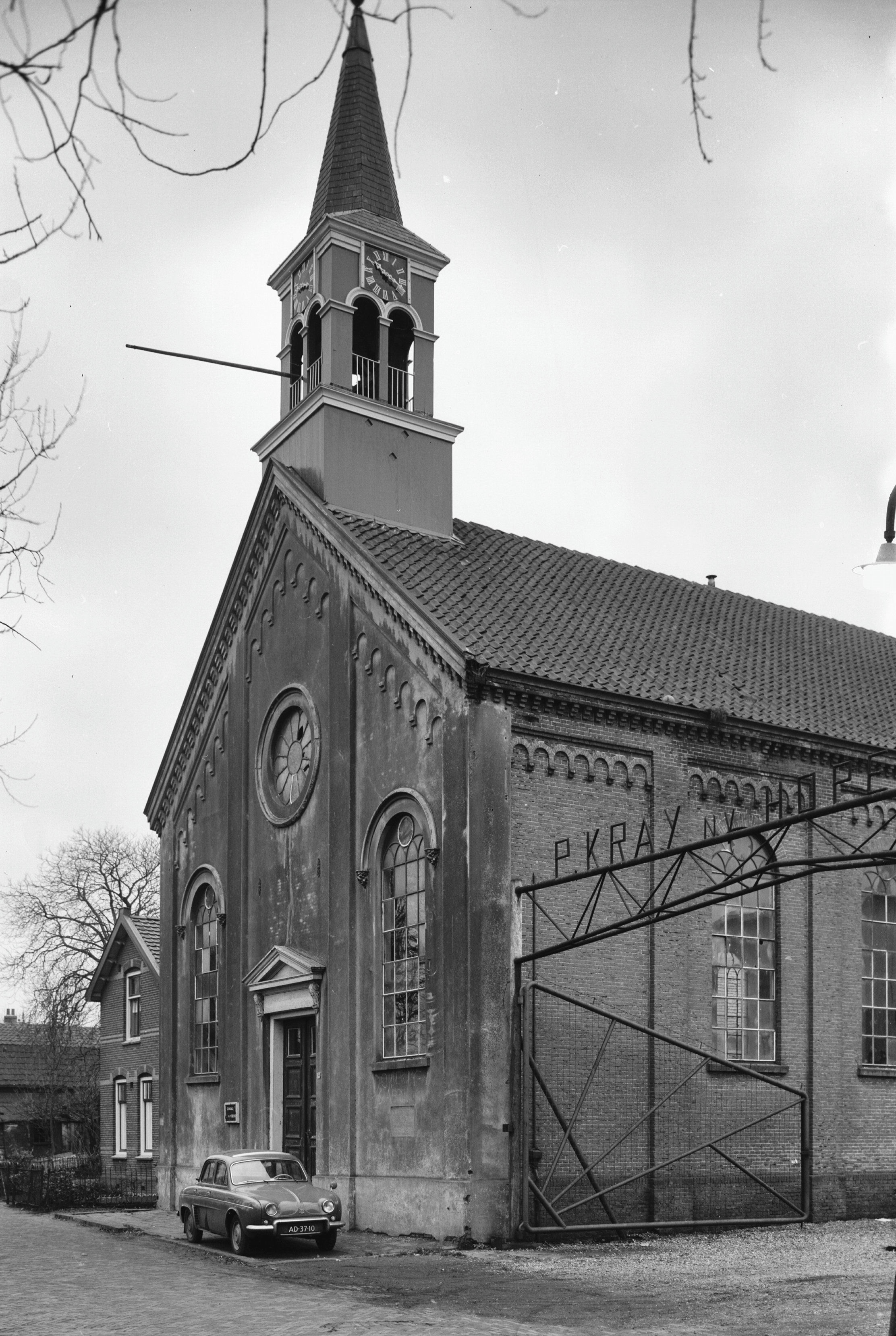 Nederlands Hervormde Kerk - Oost-Knollendam, Dorpsstraat: aanzicht-gesloopt in 1982